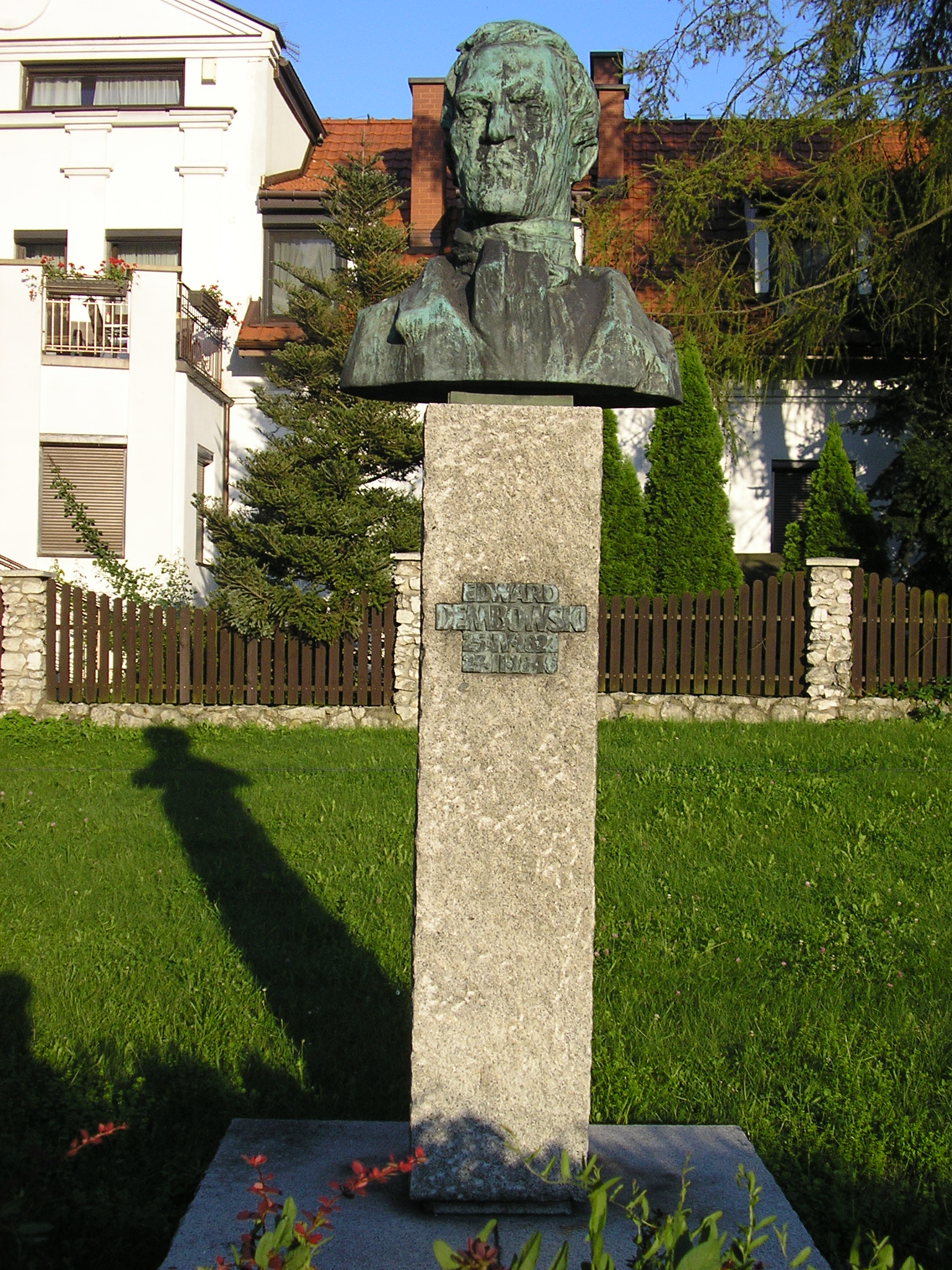 Pomnik Edwarda Dembowskiego na Placu Lasoty w Krakowie.